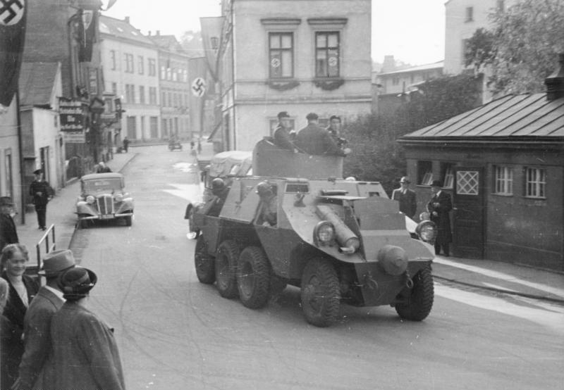 Einmarsch in das Sudetenland. Pz.-Spähwagen auf der Fahrt durch eine Stadt. German armored cars driving through a town in the Schatzlar-Freiheit area. Okt. 1938 Raum Schatzlar-Freiheit. Sudetenland.